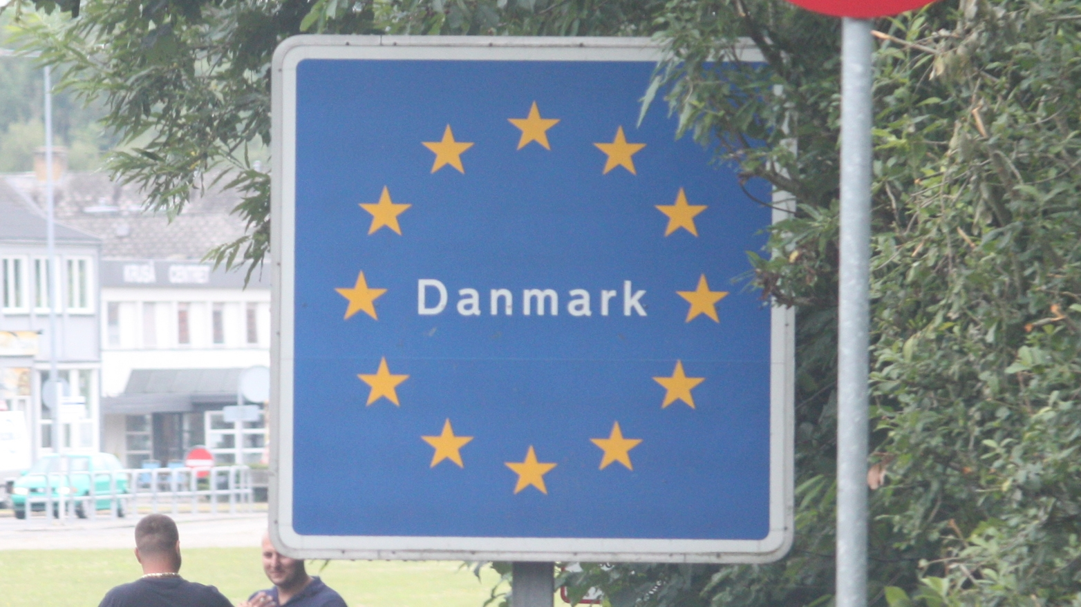 Dänisches Grenzschild